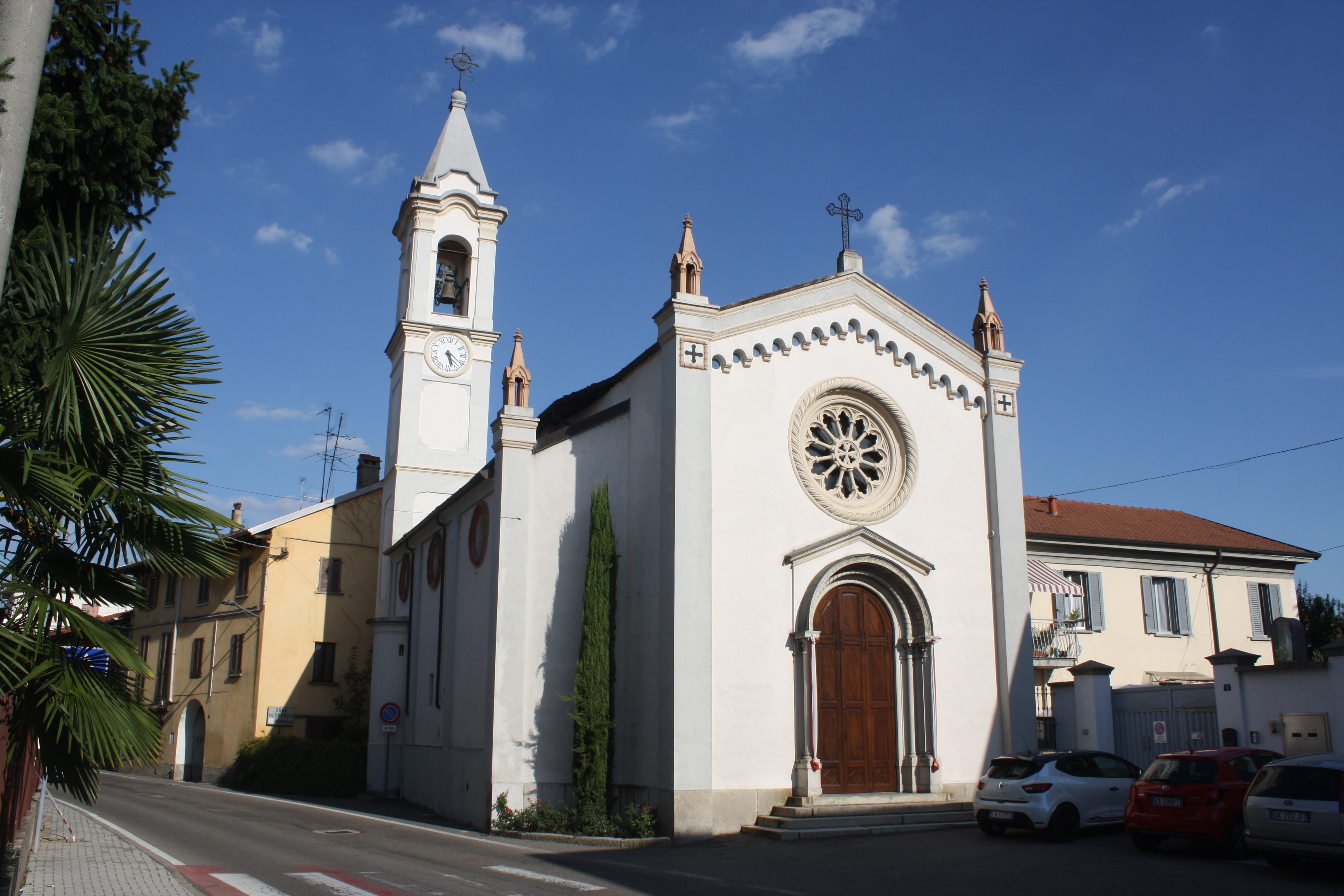 La chiesa vecchia dei Santi Nazaro e Celso a Prospiano, frazione di Gorla Minore. This is a photo of a monument which is part of cultural heritage of Italy.